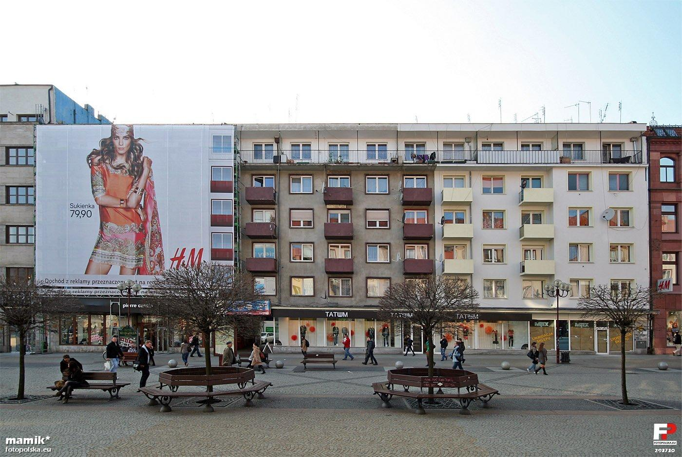 Pierwsze od 9 lat zdjęcie tego budynku, część ocieplona i pomalowana, reszta czeka na remont